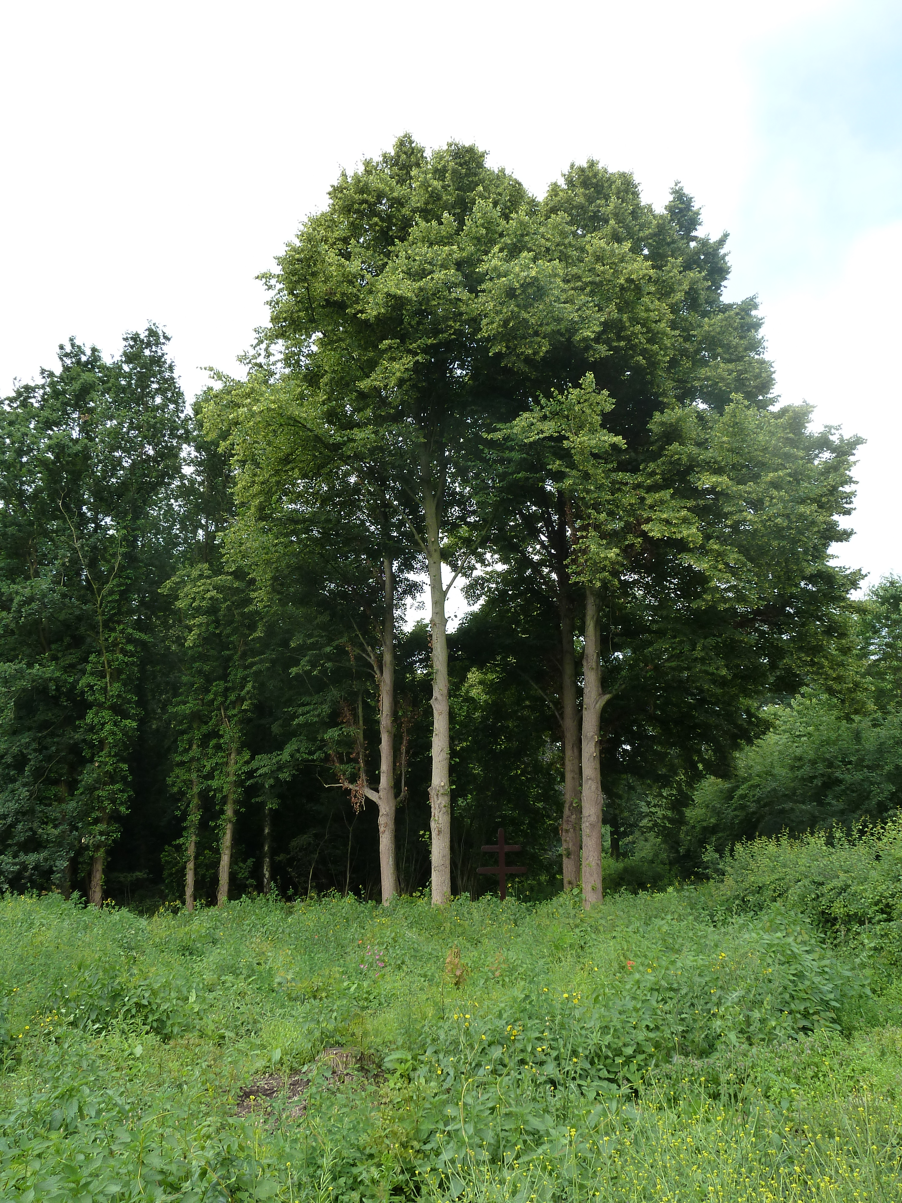 Hagelkruis Sint Odiliënberg, Roerdalen, Limburg, Nederland